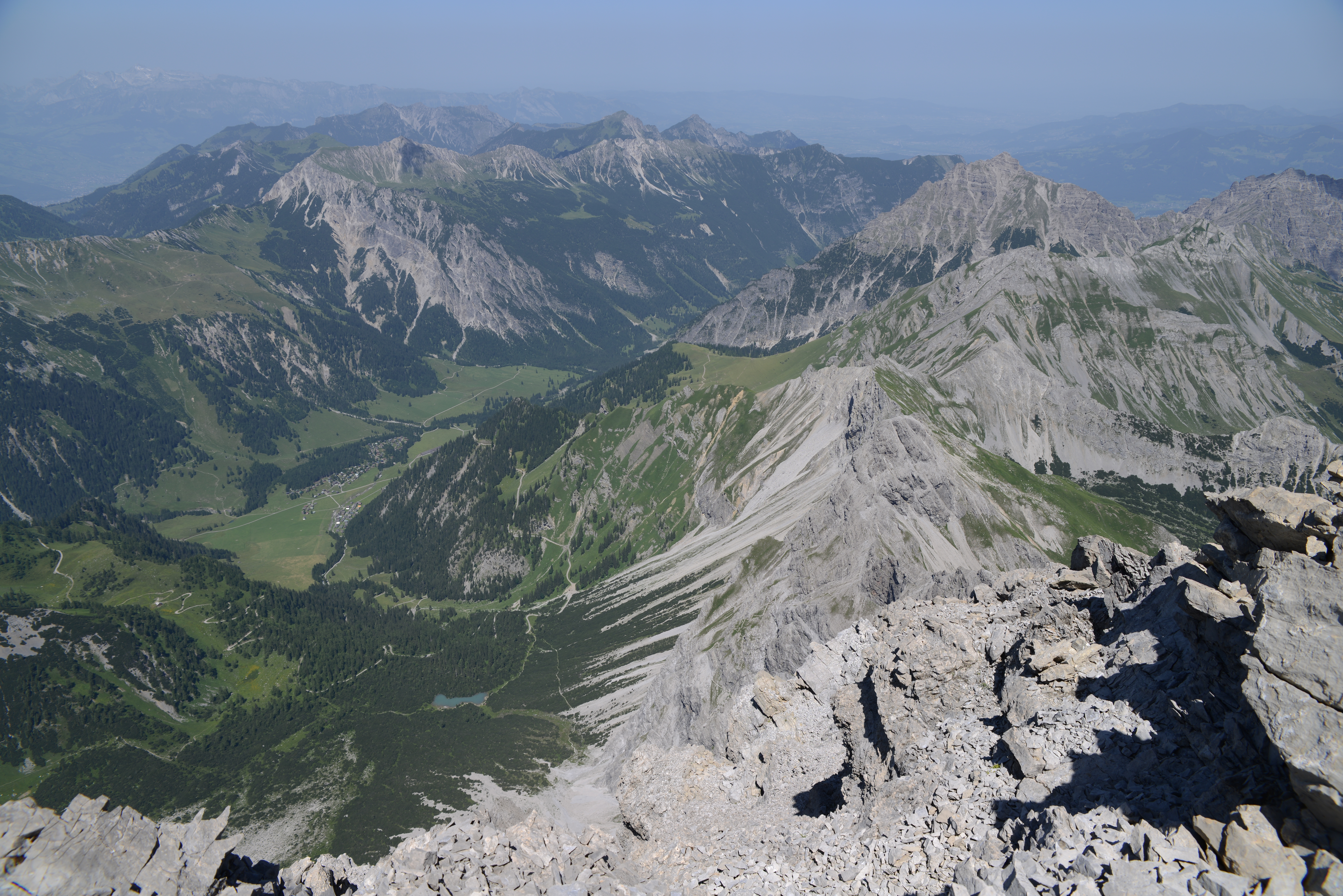 Vom Panüelerkopf sieht man auf die 1500 Meter tief gelegene Alpe Nenzinger Himmel. Der schräg nach oben verlaufende Weg am Hirschsee führt direkt in den Felsen zum Spusagang. Er endet auf der Oberzalimscharte. Auf dieser Kreuzung teilen sich die Steige: Einer hoch zum Straußsteig, der auf den Panüelerkopf führt. Ein Verbindungssteig geht in Richtung Leibersteig, der auf der Mannheimer Hütte endet. Und ein weiterer Steig geht talwärts zur Oberzalimhütte. Alle Steige sind gut gewartet, verlangen jedoch Schwindelfreiheit, Trittsicherheit und eine gute Kondition. Wird die Tour von Brand aus gegangen, liegt die Gehzeit bei 5 bis 6 Stunden bis zum Gipfel.